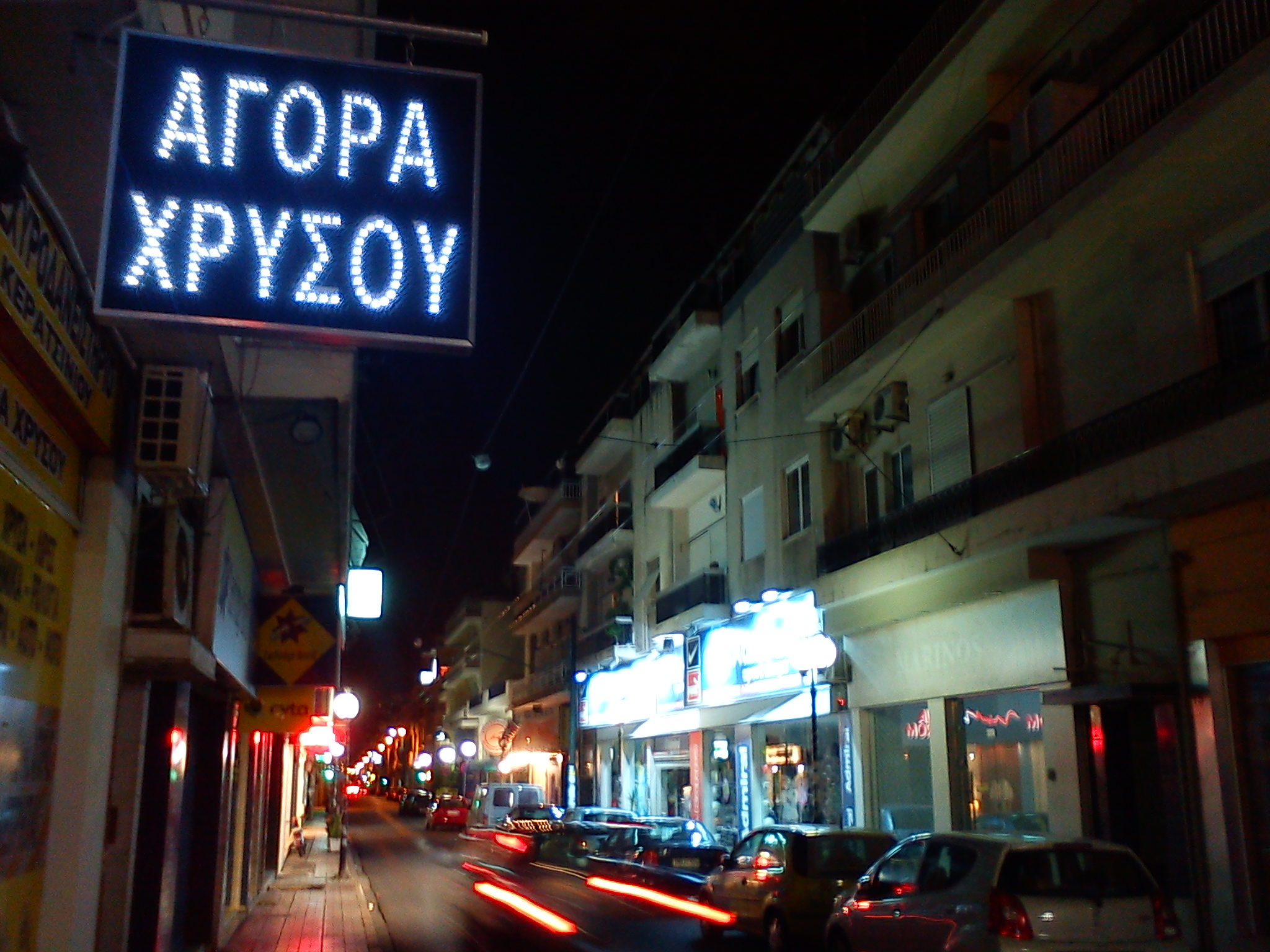 Ενεχυροδανειστήριο χρυσού 24ωρης λειτουργίας στα Ταμπούρια του Πειραιά.